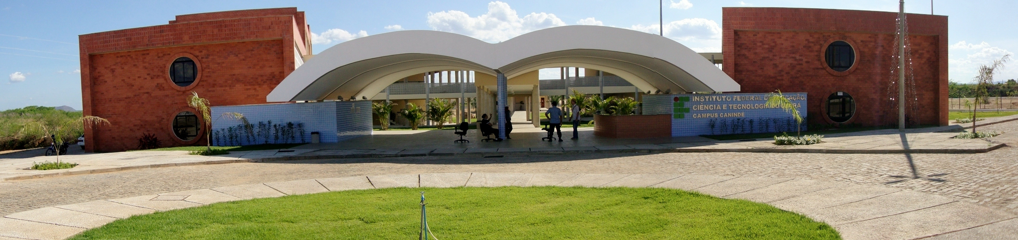 Vista panorâmica da fachada principal da entrada do Campus de Canindé do IFCE